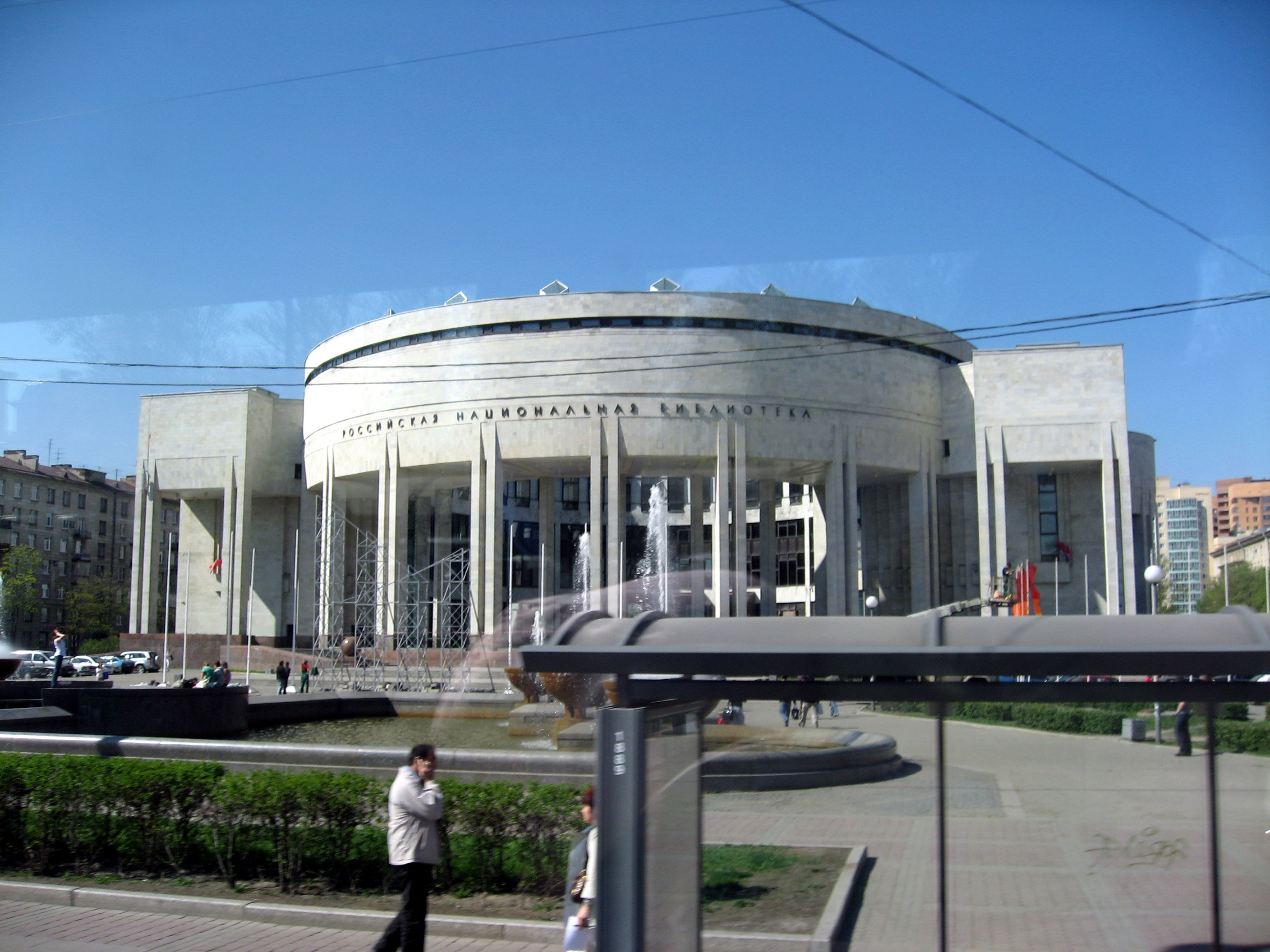 Sankt-Petěrburg (Petrohrad), budova Ruské národní knihovny